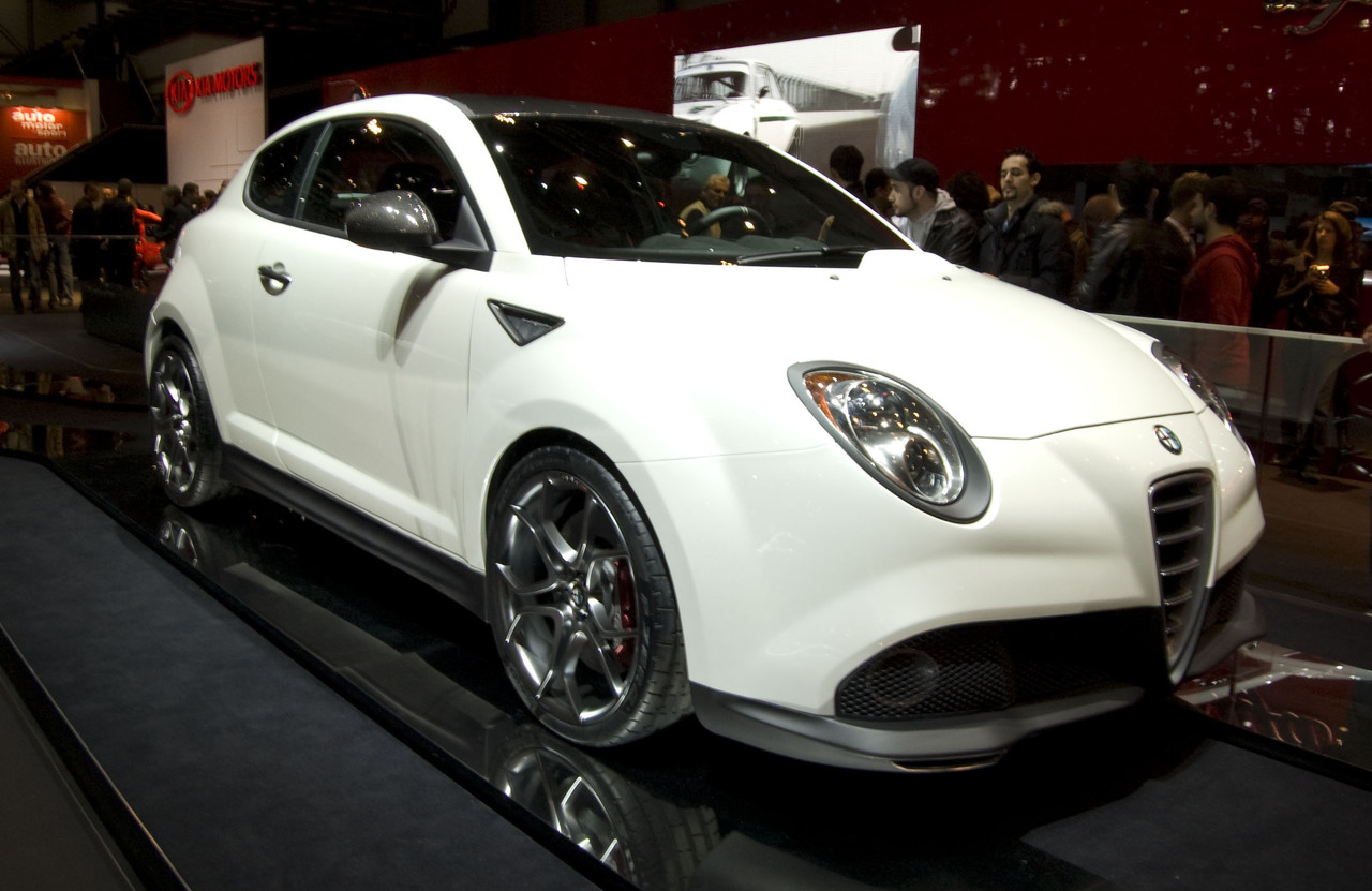 Alfa MiTo GTA en el Salón de Ginebra 2009